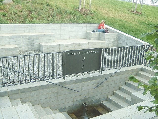 Bonifatiusbrunnen, neu gefasst im Zuge der Errichtung des Bonifatius-Pilgerweges, Brunnen in Frankfurt - Kalbach, Neubauviertel Riedberg